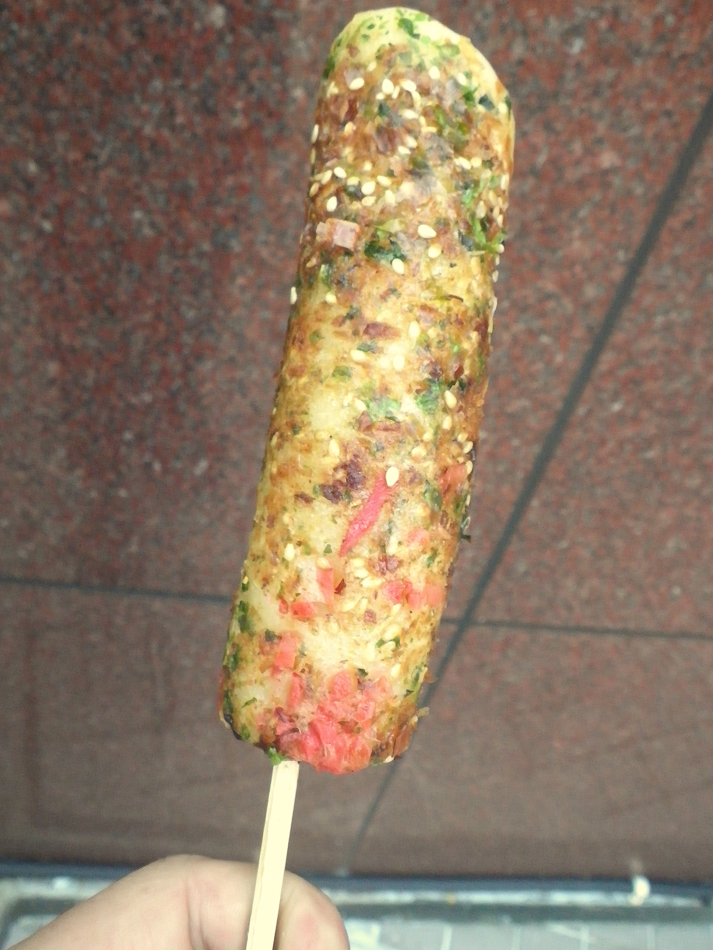 くるくるお好み焼き